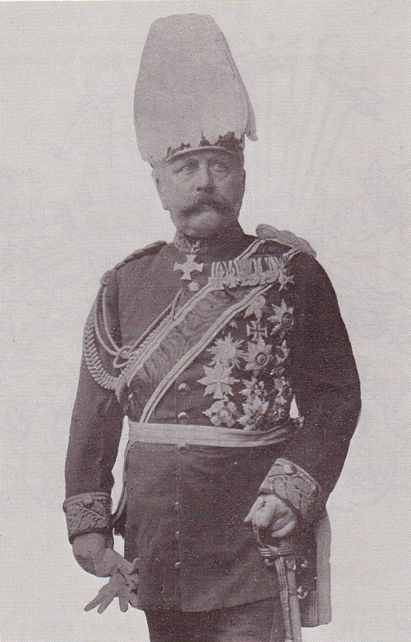 Karl von Hänisch (1829-1908)